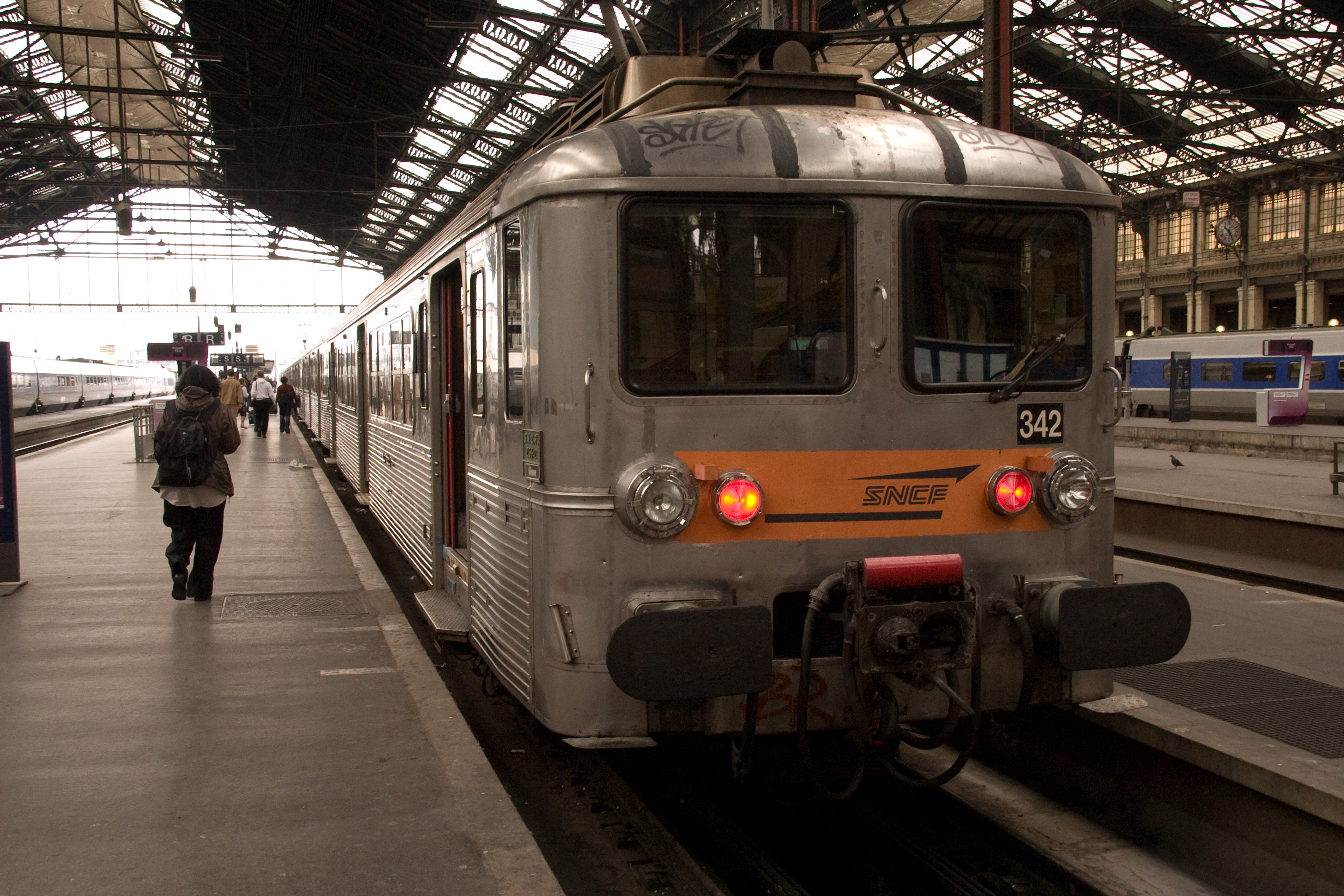 Gare de Lyon, Paris, France